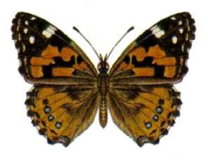 Australian painted lady (Vanessa kershawi)